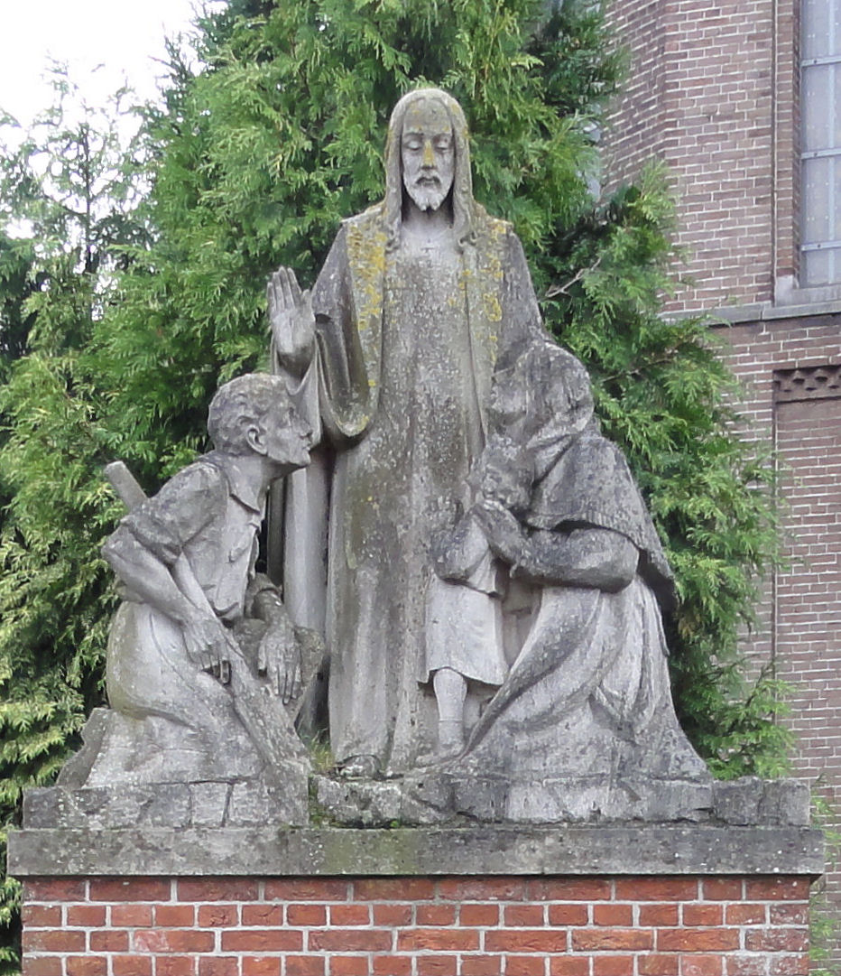 Heilig Hartbeeld in Overasselt